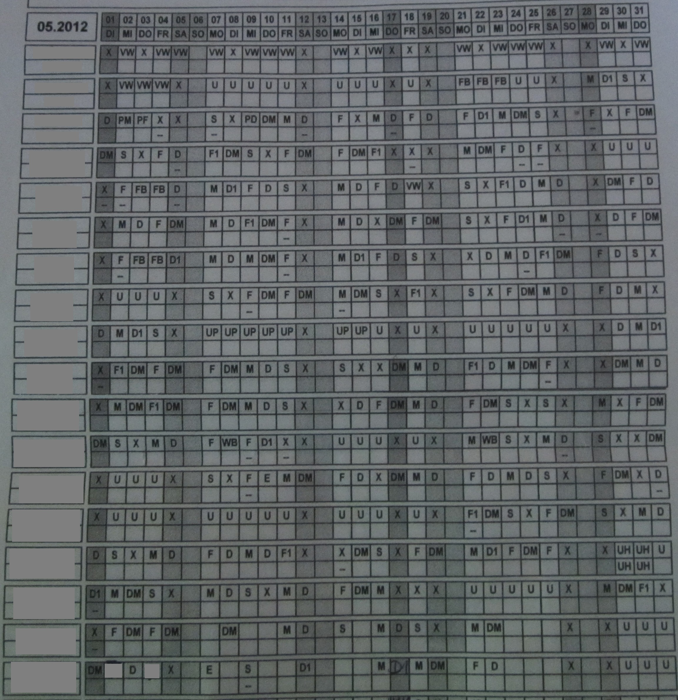 Dienstplan einer Dialysestation, Beispiel/Roster of a Dialysiscentre, example